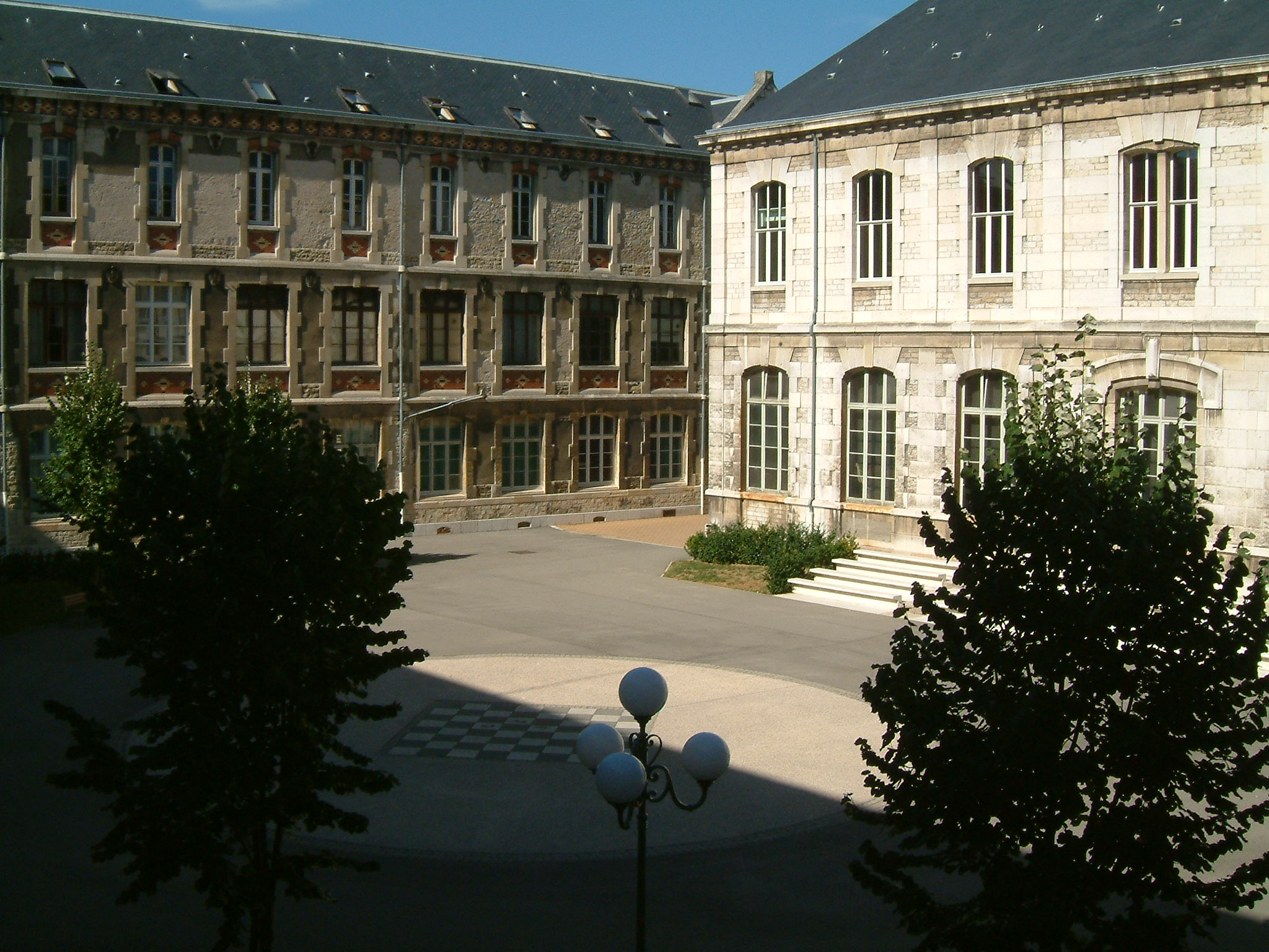 Lycée Carnot, Dijon, FRANCE.